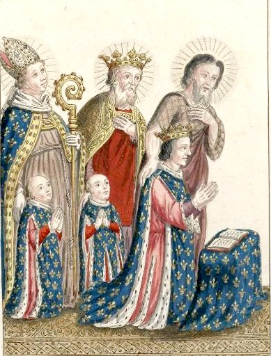 Jean de Berry et son fils Charles et Jean II